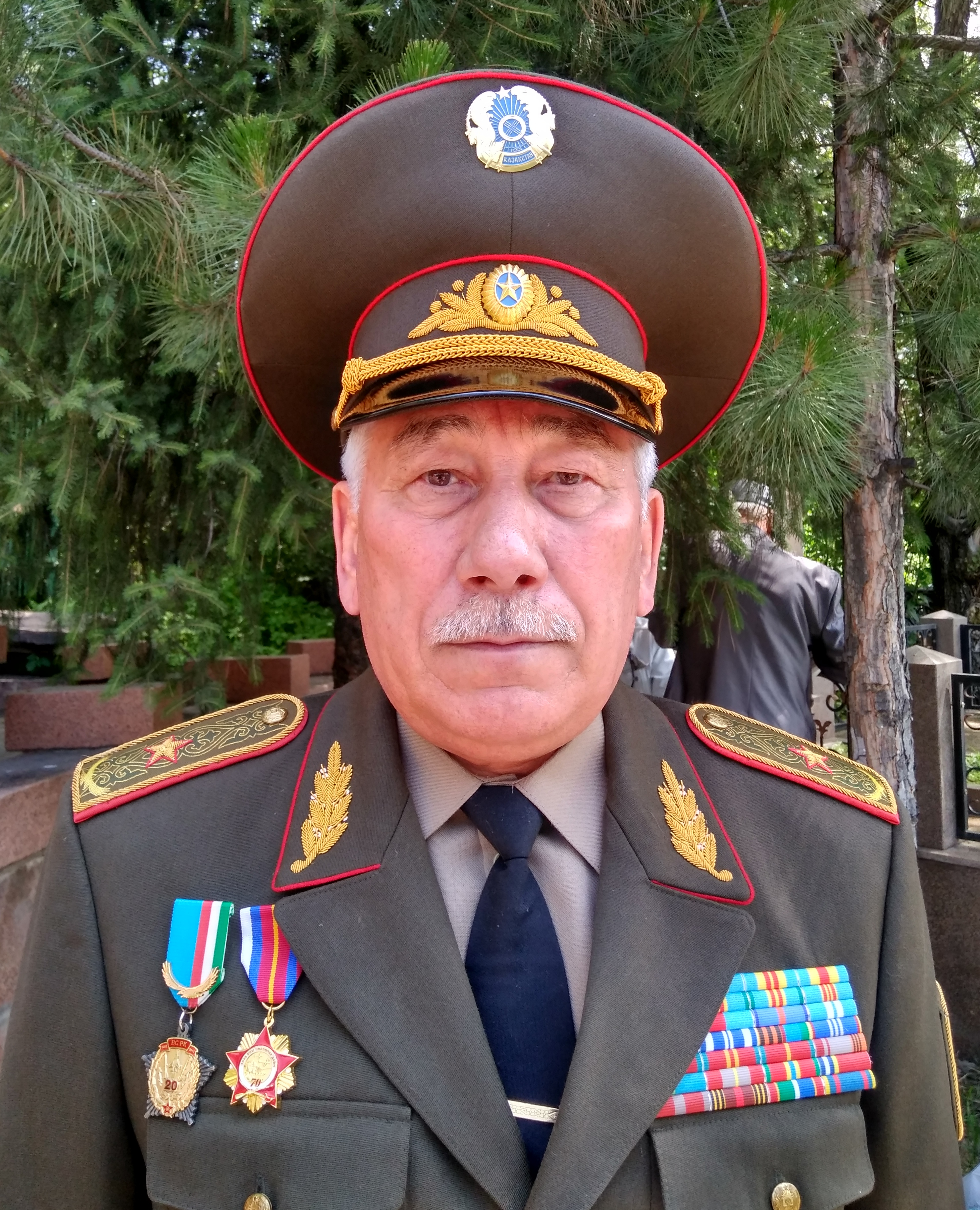 Телегусов Махмут Утегенович, генерал-майор